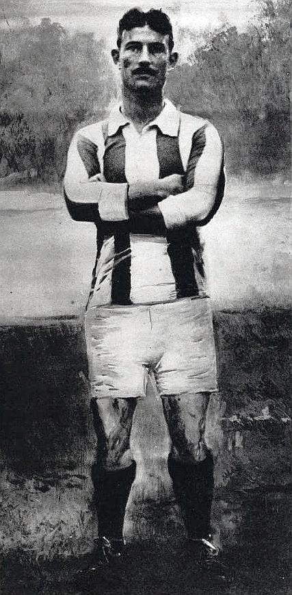 Lucien Gamblin, en 1921.